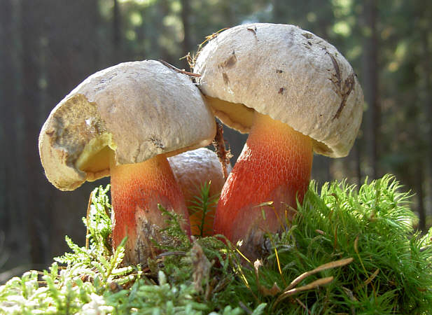 Schönfußröhrlinge (Caloboletus calopus)